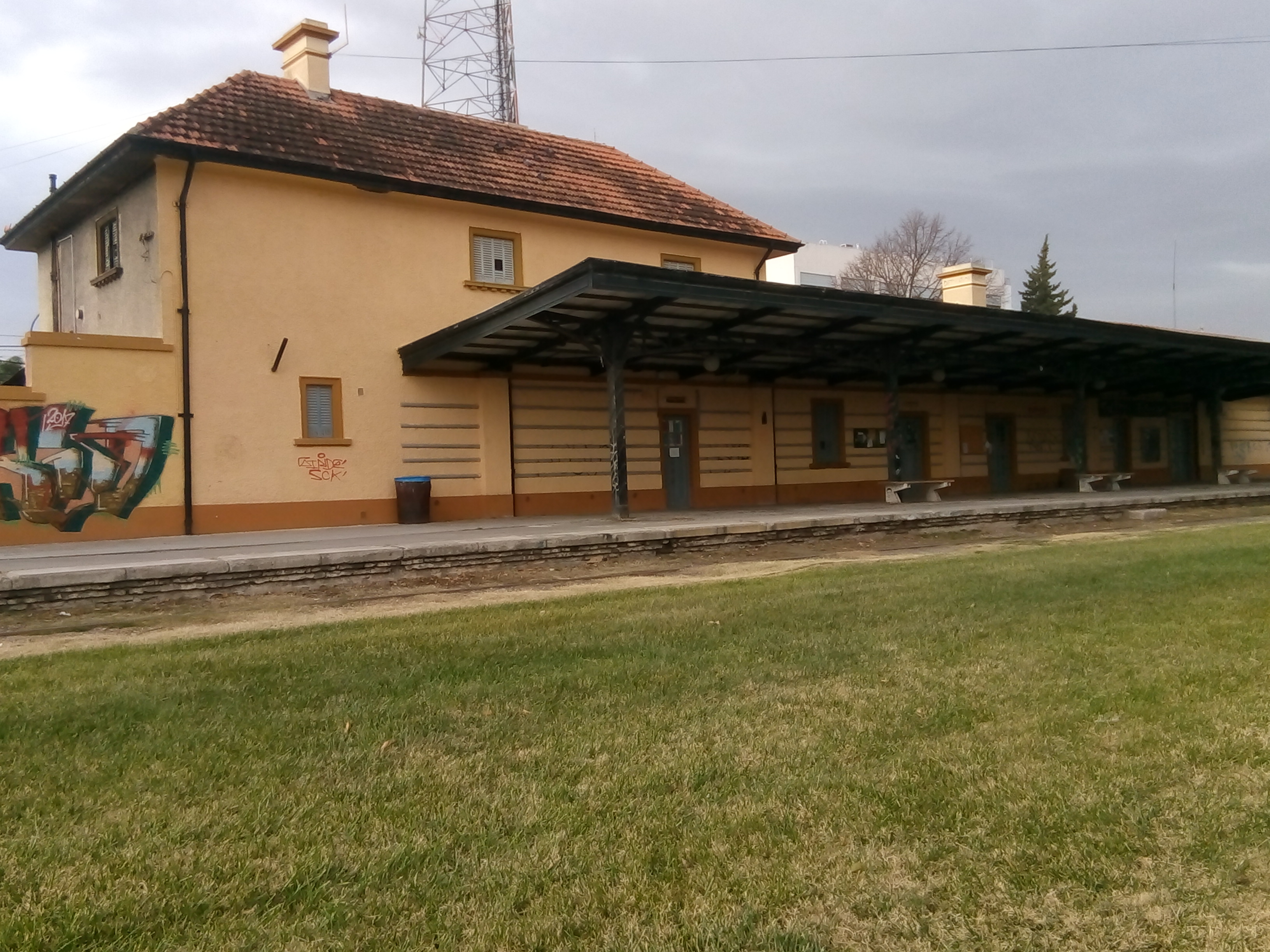 Estación ferroviaria ubicada en el centro de General Roca